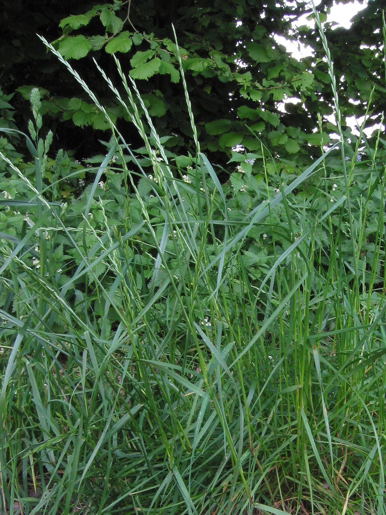 Lolium perenne ear emerging (Engels raaigras doorgeschoten plant)